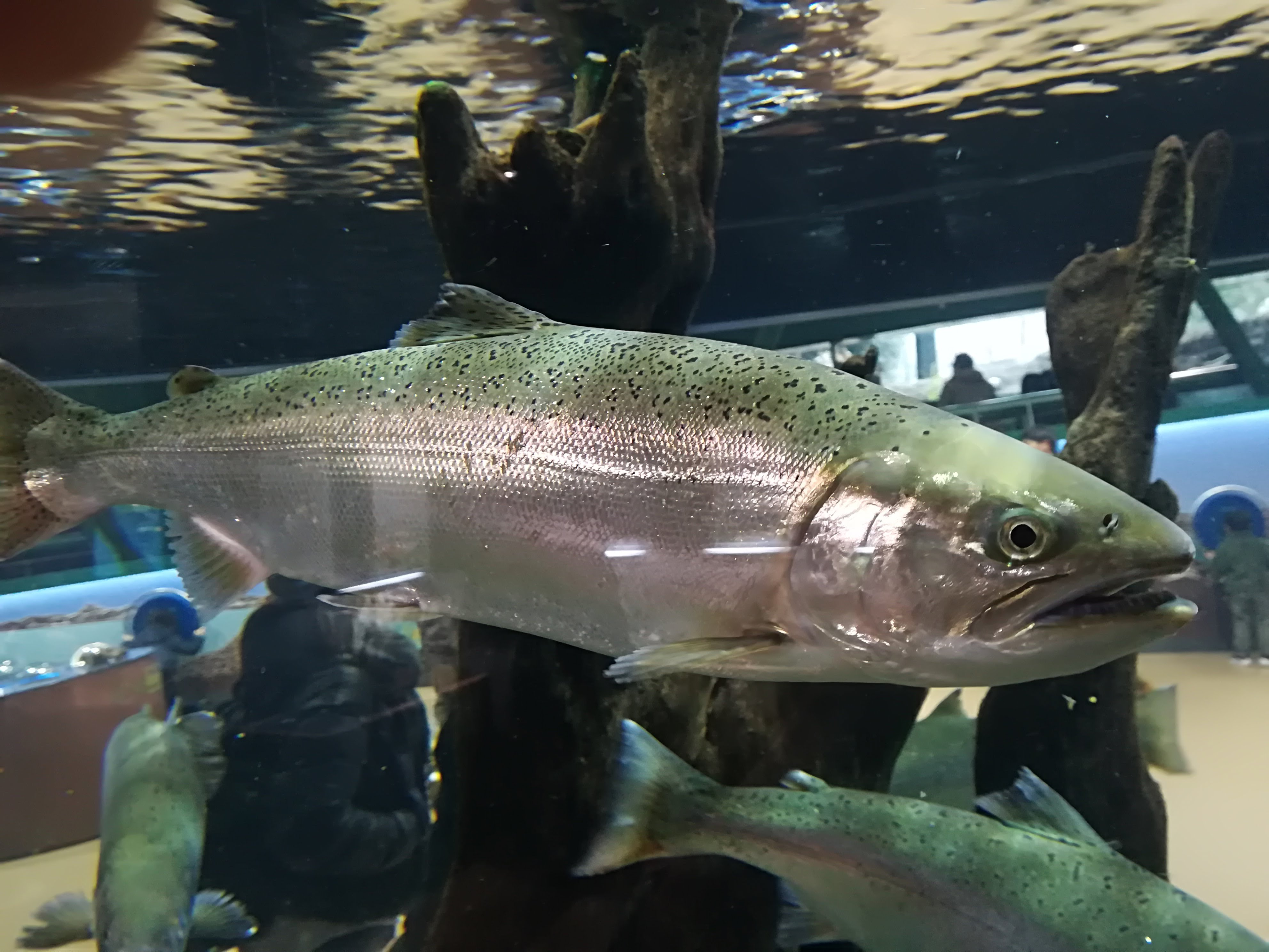 スモルトと思われるサクラマス